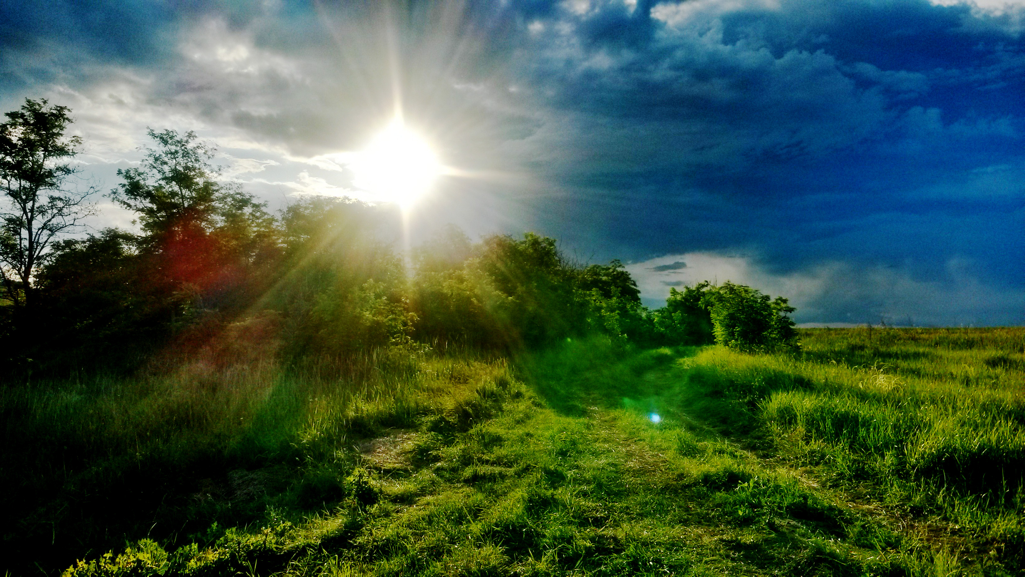 Центрально-Черноземный им.проф.В.В.Алёхина, Горшеченский район This image is related to the protected area of Russia number 4600019